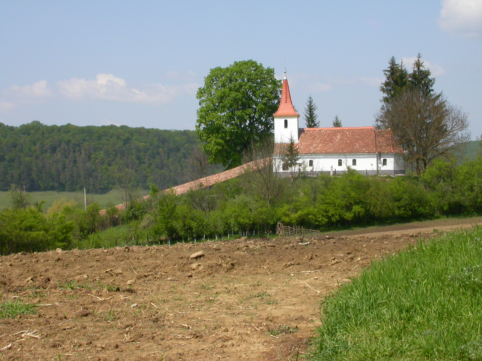 Biserica "Sf. Gheorghe" 1721